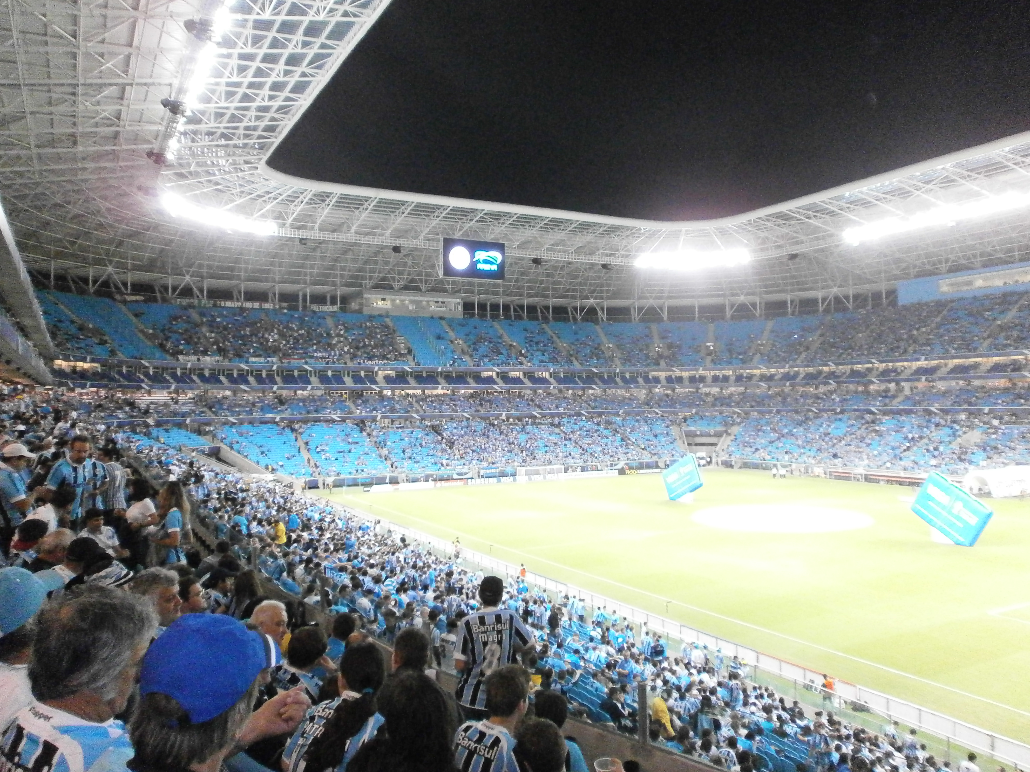 Arena do Grêmio. Jogo contra Fluminense pela Libertadores 2013